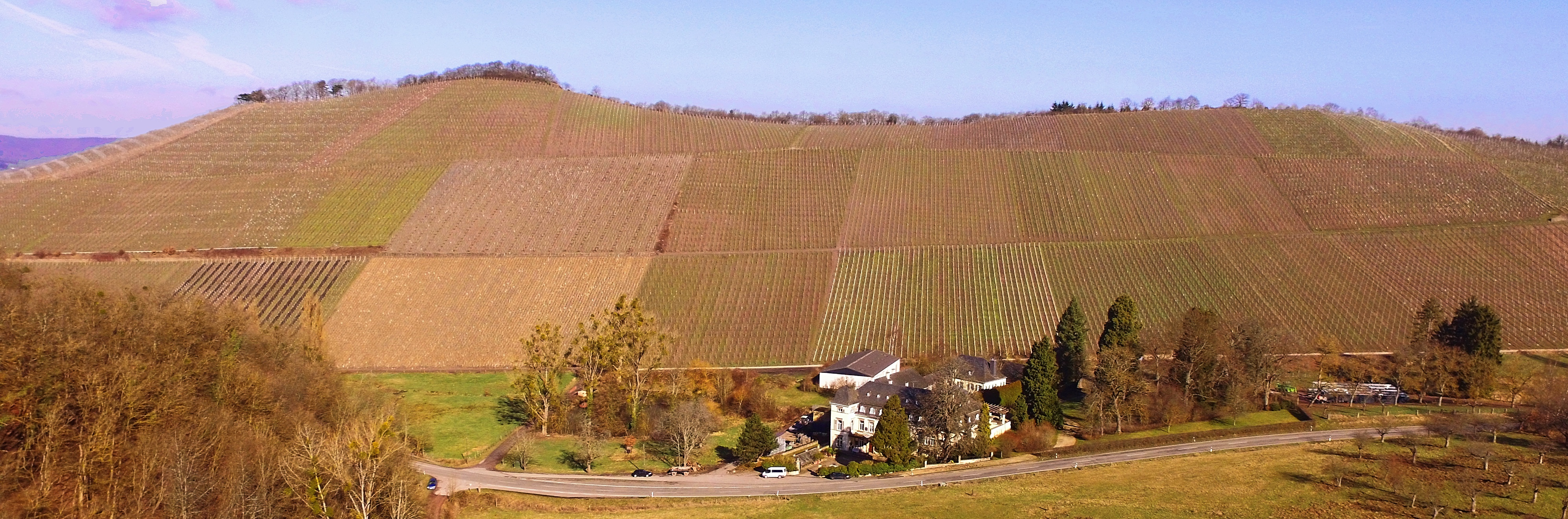 Mittlerer Teil des Wiltiger Scharzhofbergs. Unten sieht man die Gebäude es neuen Scharzhofs (großes Gebäude vorne) heute im Besitz des Weinguts Egon Müller und des alten Scharzhofes (kleines Gebäude hinten), heute im Besitz der Bischöflichen Weingüter Trier